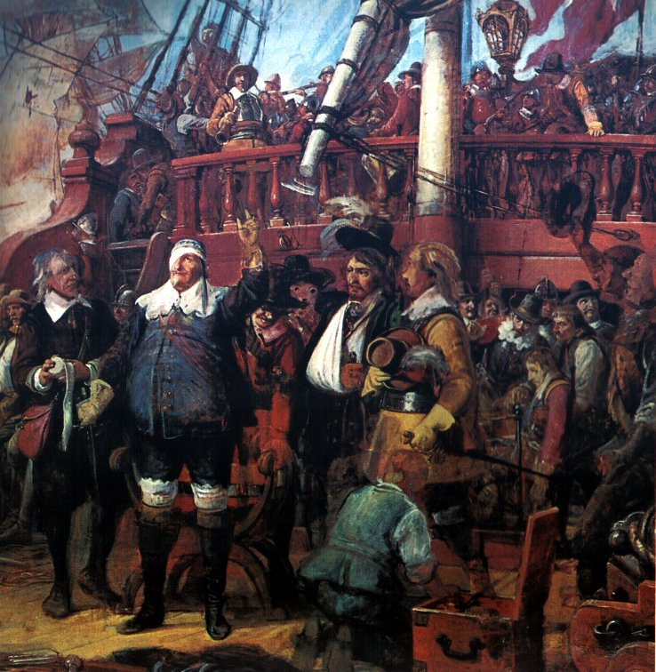 Wilhelm Marstrand - Christian IV ved Kolberg Heide (fragment)